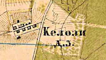 Деревня Келози на карте 1885 года.